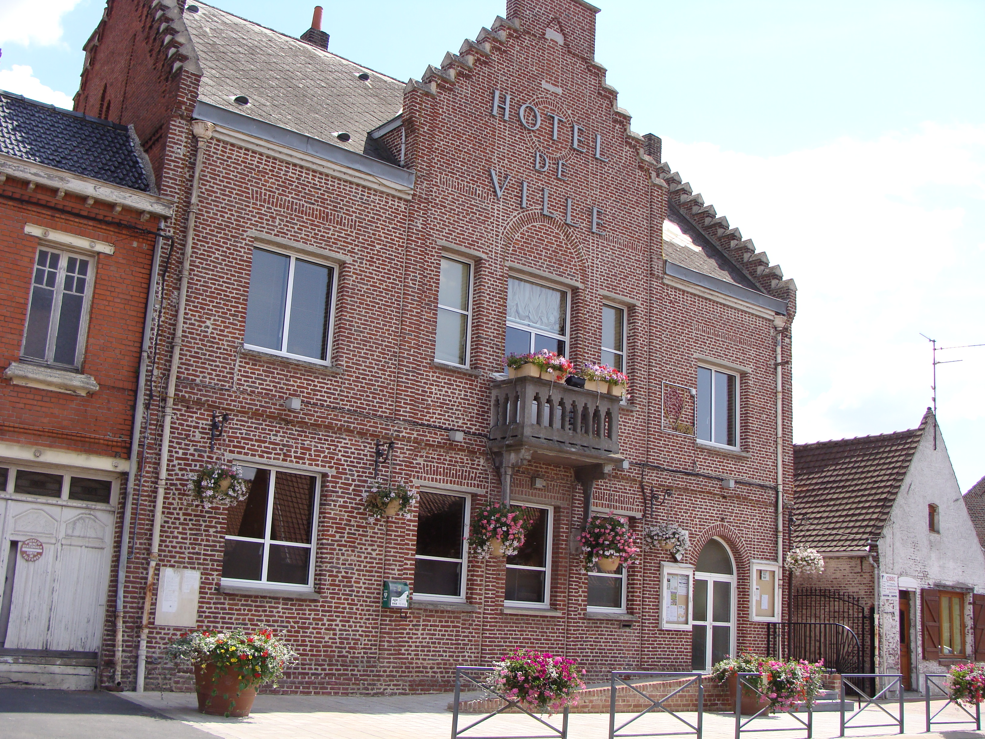 Masny - Mairie